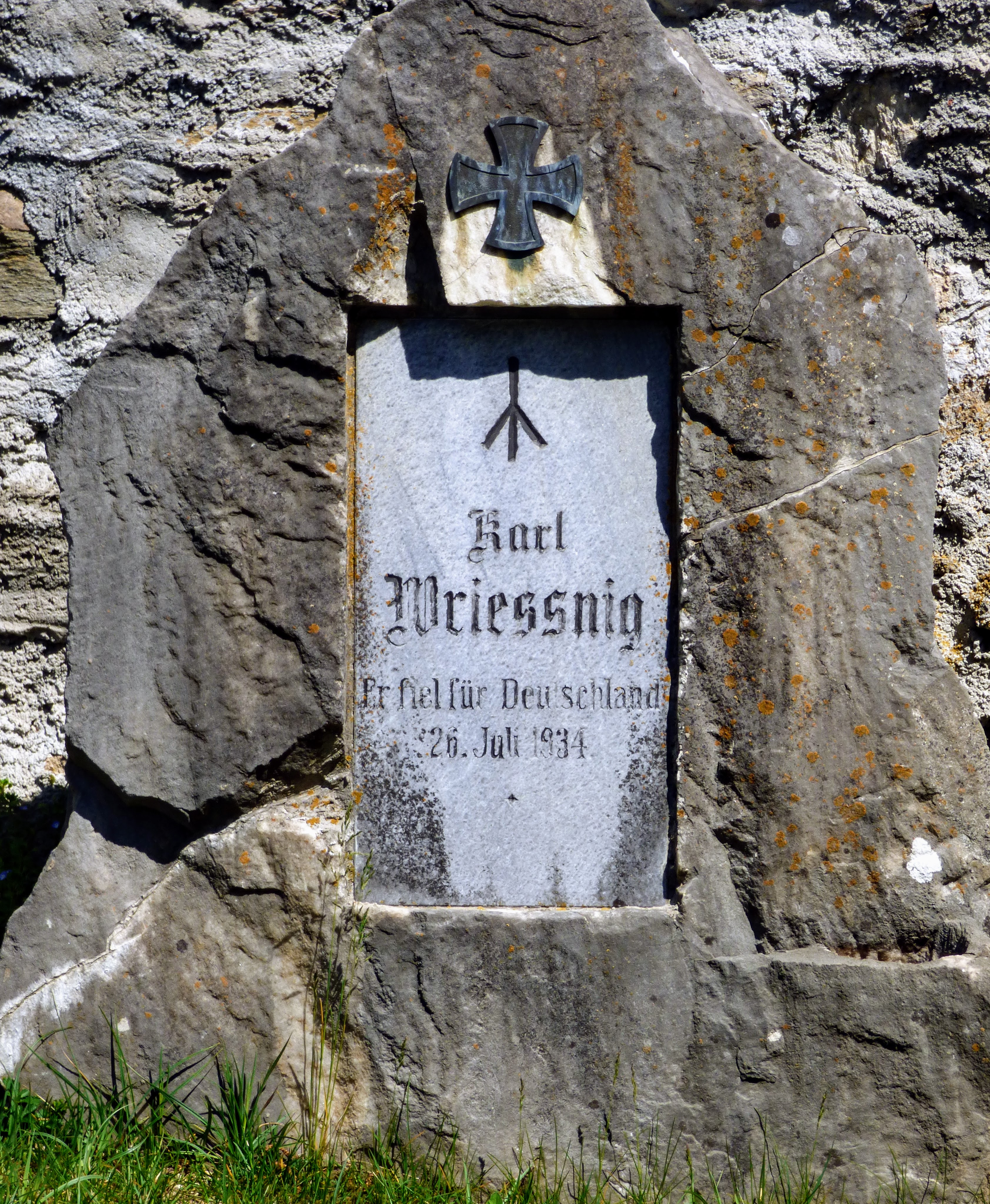 Grabstein für Karl Wriessnig Beteiligt auf Seiten der Nationalsozialisten am Juliputsch 1934 Todesrune Inschrift am Grabstein: "Er starb für Deutschland"